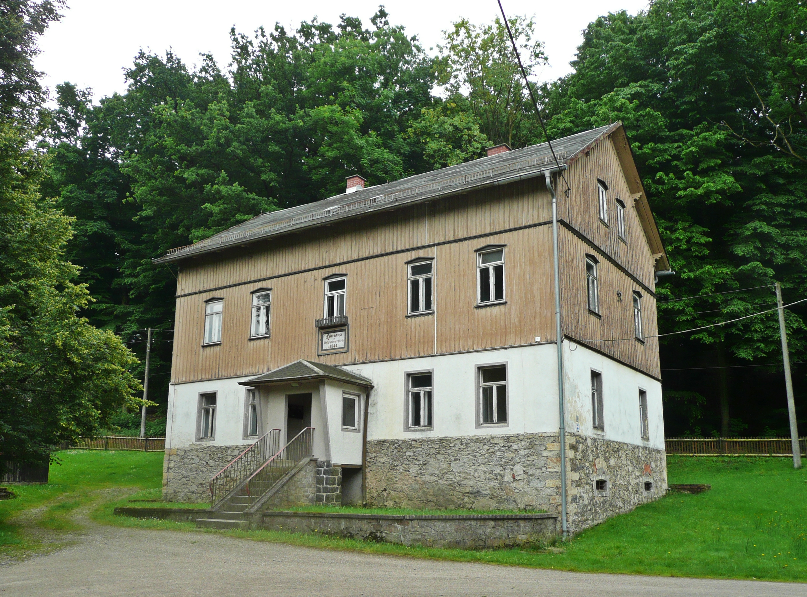 Das Bild zeigt das 1844 erbaute Huthaus des Rothschönberger Stolln am IV. Lichtloch des Stollens in Reinsberg. Das Huthaus war Sitz der Verwaltung des Rothschönberger Stollns und wurde später als Wohnhaus genutzt.